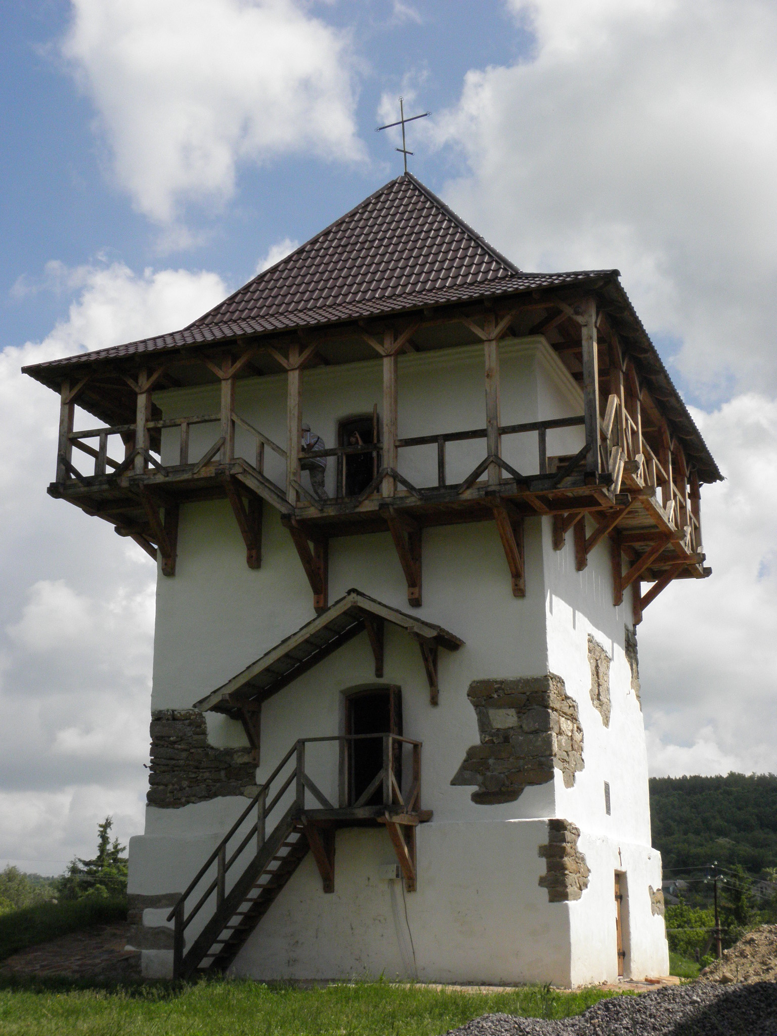 Башта фортеці, Ямпільський район, с. Буша вул. І.Богуна,12а